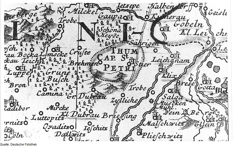 Original image description from the Deutsche Fotothek Großdubrau-Sdier. Karte des Bautzener Kreises von den Homannschen Erben, 1746 (Sign.: VII 72)